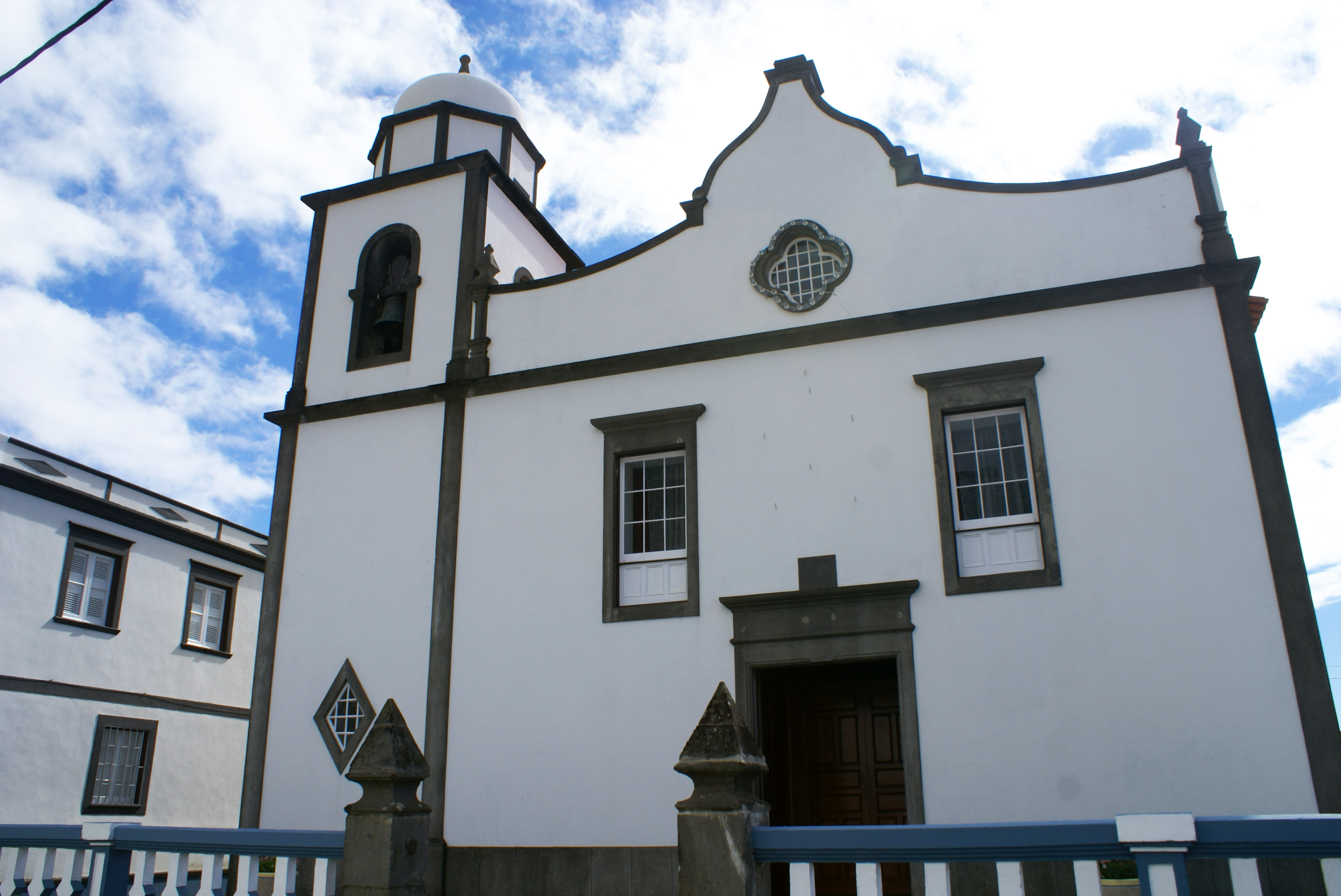 Igreja de São José, Fajã Grande, ilha das Flores, Arquivo de Villa Maria, ilha Terceira, Açores